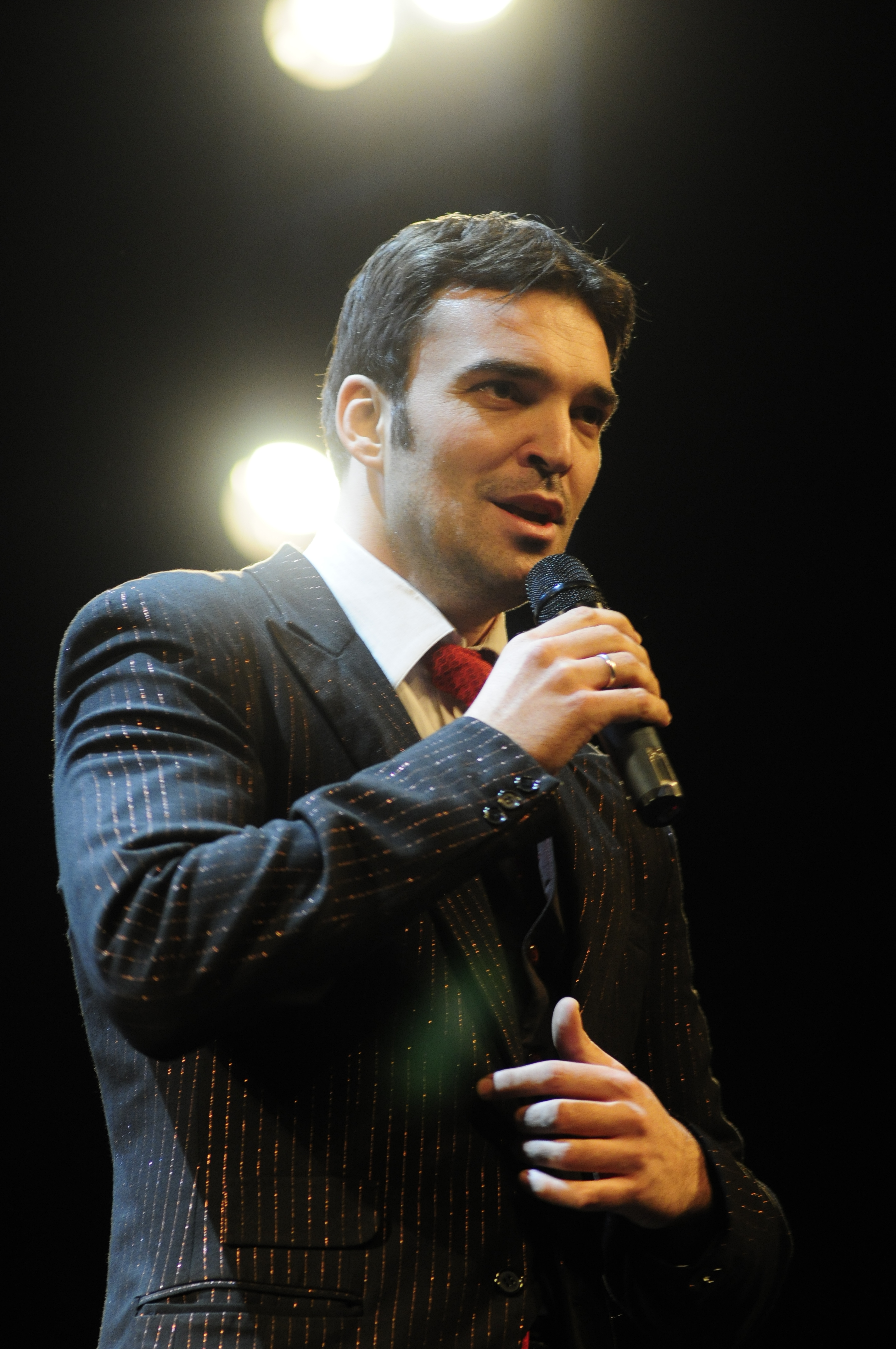 Predstava "Pod sjajem zvezda"